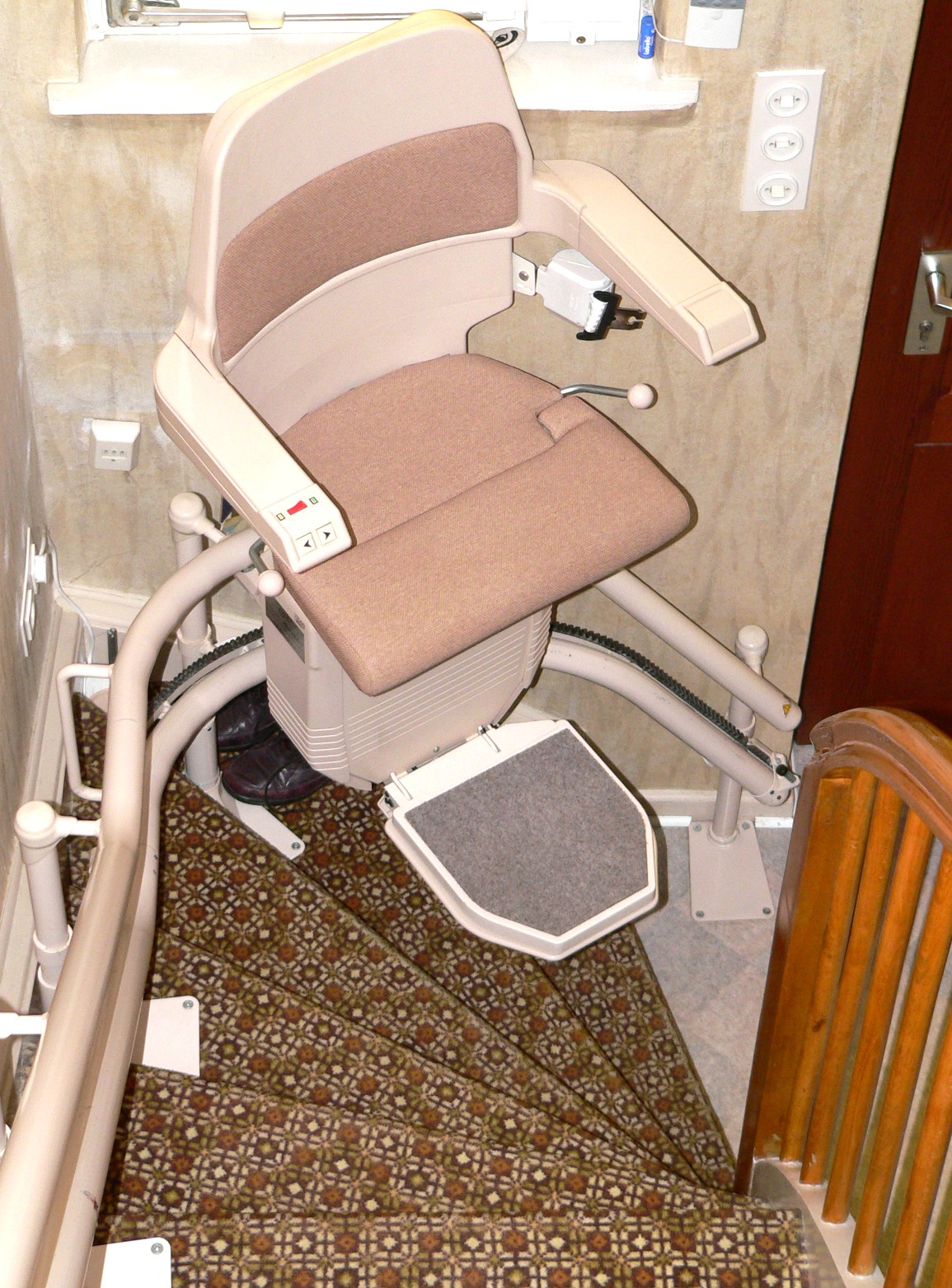 stairlift; Treppenlift, Treppenschrägaufzug